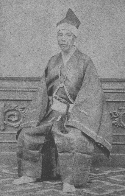 松平茂昭 Matsudaira Mochiaki 鶏卵紙。